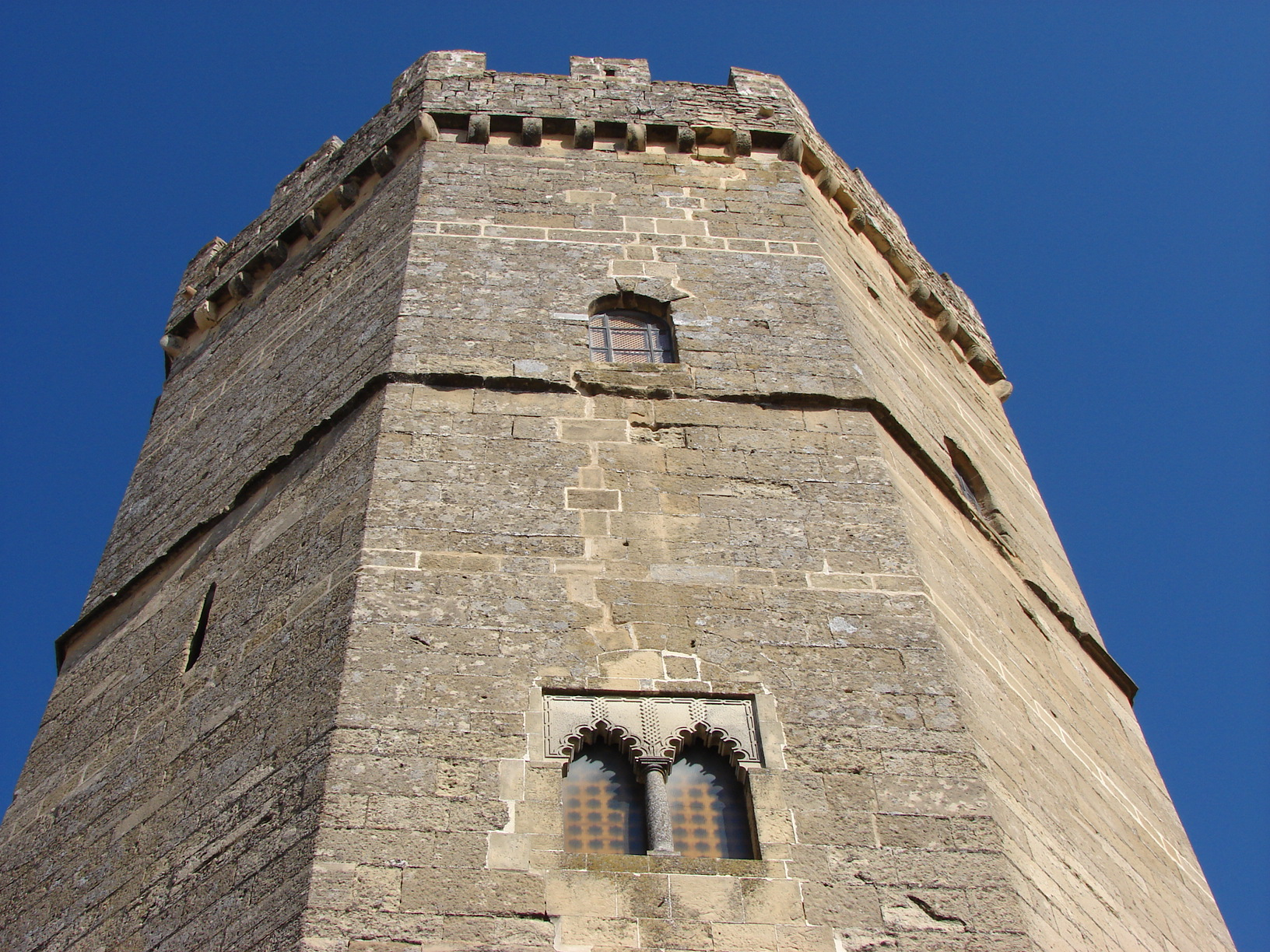 La llamada "torre de Boabdil" en la localidad de Porcuna (Jaén, España).